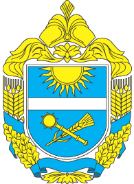 Герб Петровського району Кіровоградської області